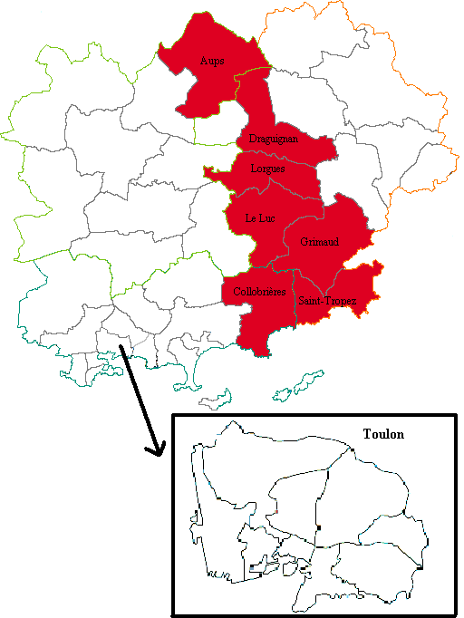 Quatrième circonscription législative du département du Var (France)